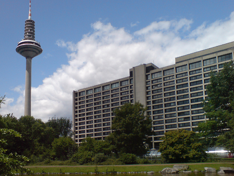 Miquelanlage zwischen Miquelknoten und Europaturm (links) und Deutscher Bundesbank (rechts)